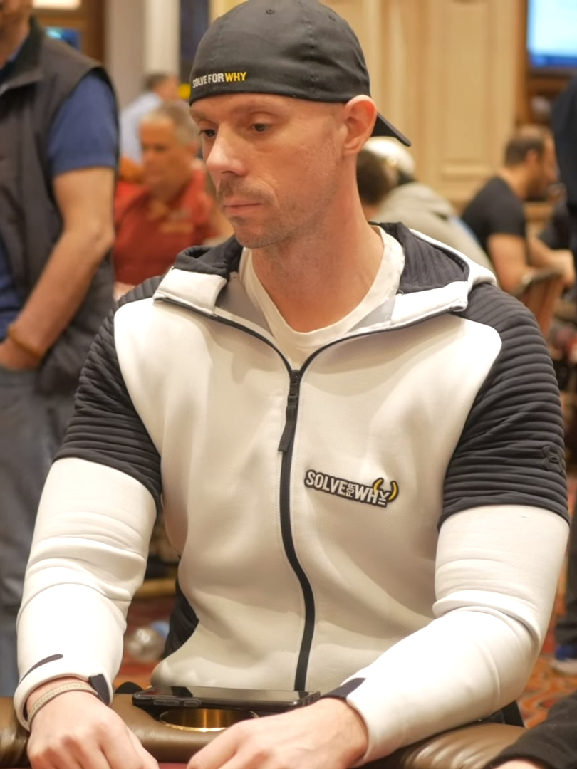 Matt Berkey bei der WPT at Venetian